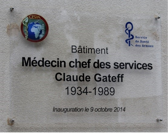 Plaque inaugurale apposée le 9 octobre 2014 au Centre d'épidémiologie et de santé publique des armées